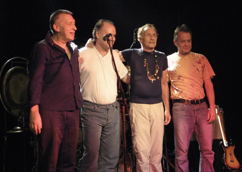 German band Guru Guru, live at Karlstorbahnhof in Heidelberg/Germany, September 27, 2007. Left to right: Hans Reffert, Peter Kühmstedt, Mani Neumeier, Roland Schaeffer Other pictures from the same concert: Image:Guru_Guru_2007-09-27_Live.jpg, Image:Mani_Neumeier_2007-09-27.jpg